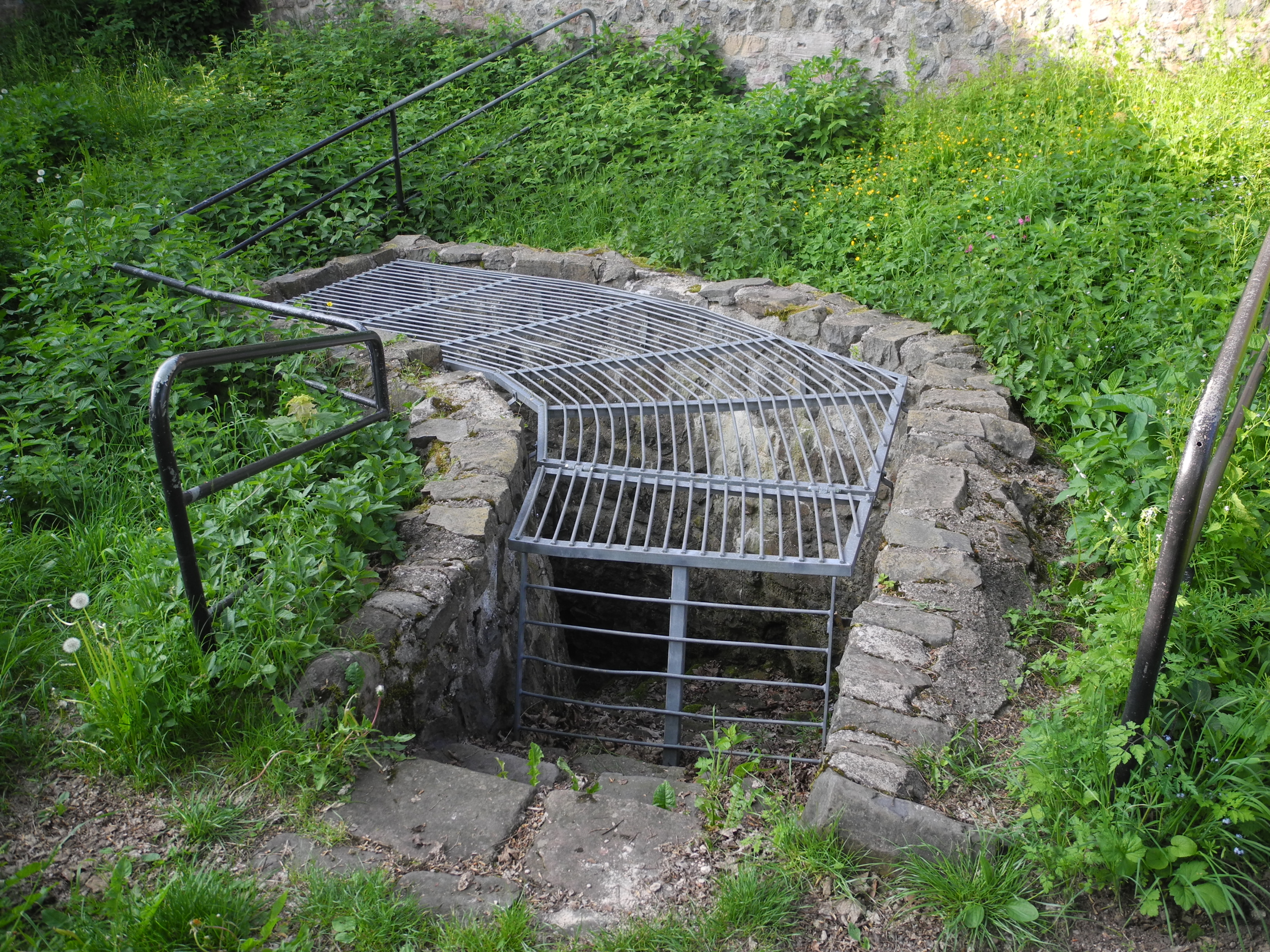 Die Ruine Auersburg ist die Ruine einer Höhenburg in der Rhön, in der Gemeinde Hilders im Landkreis Fulda in Hessen, Deutschland.